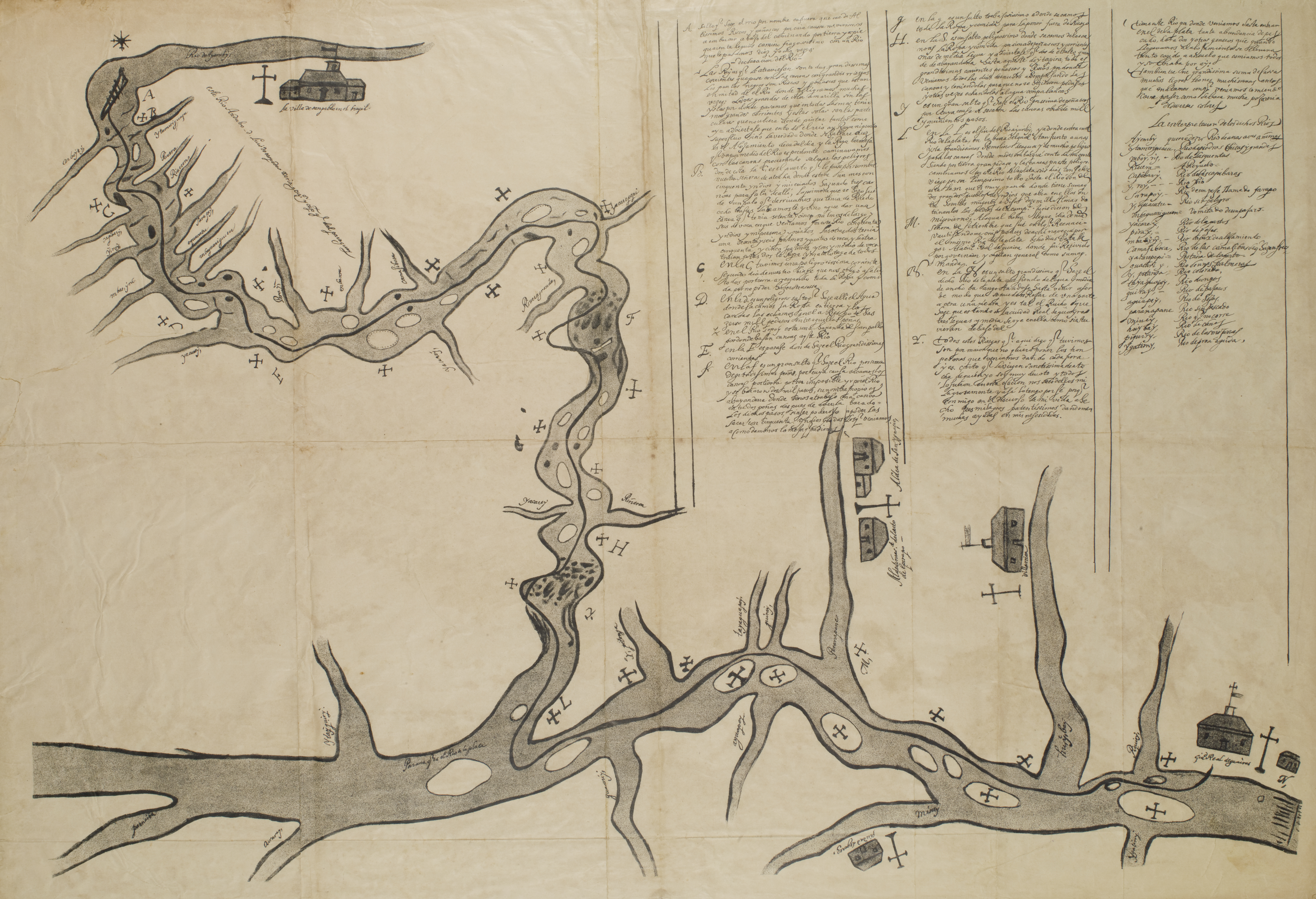 Obra que integra o acervo do Museu Paulista da USP. Coleção João Baptista de Campos Aguirra